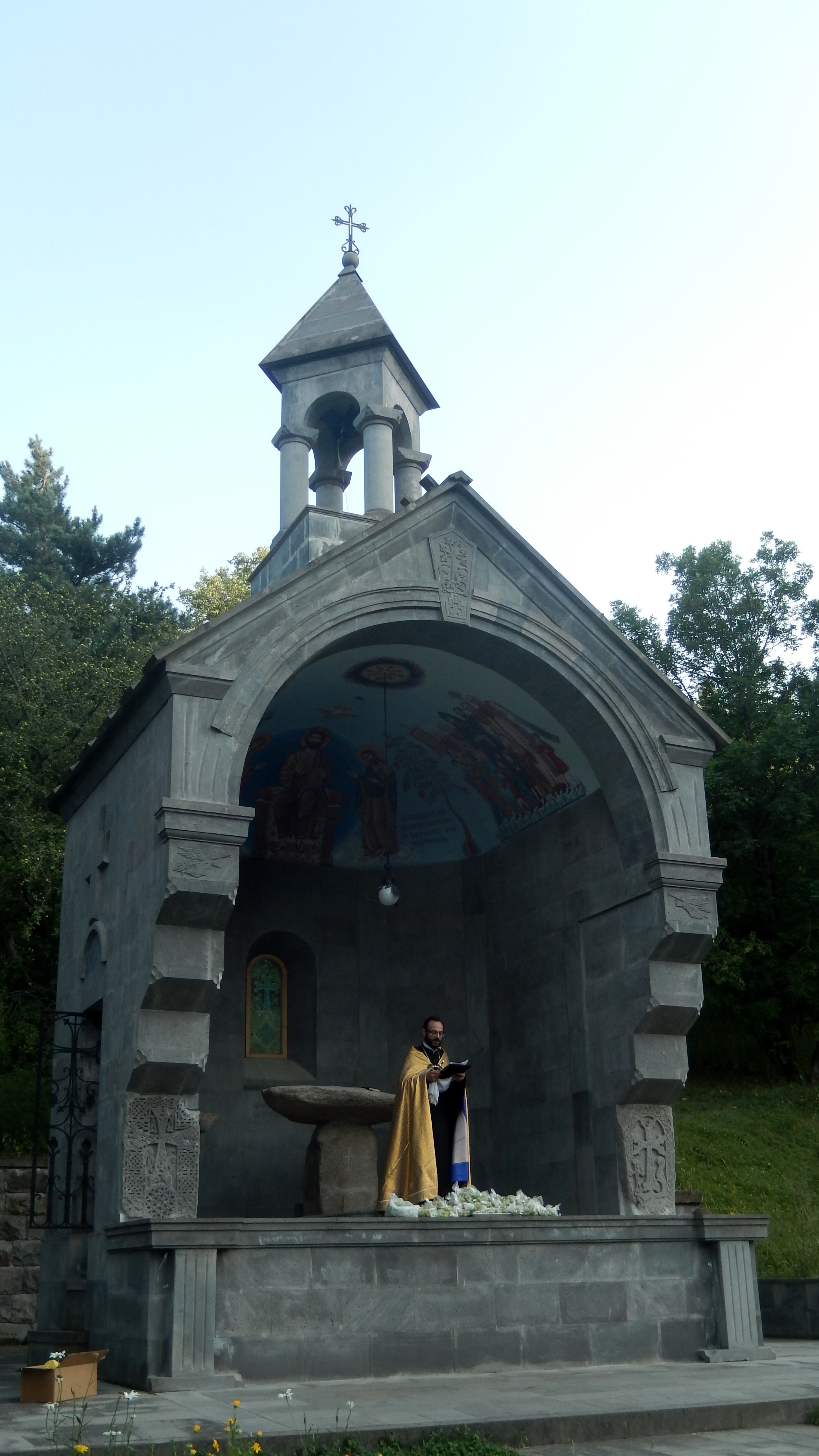 Սրբոց Մանկանց մատուռը Վանաձորի Ծիծեռնակ ճամբարի տարածքում